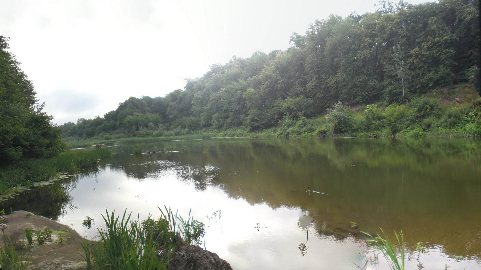 река Хопер выше села Арзянка River Khoper